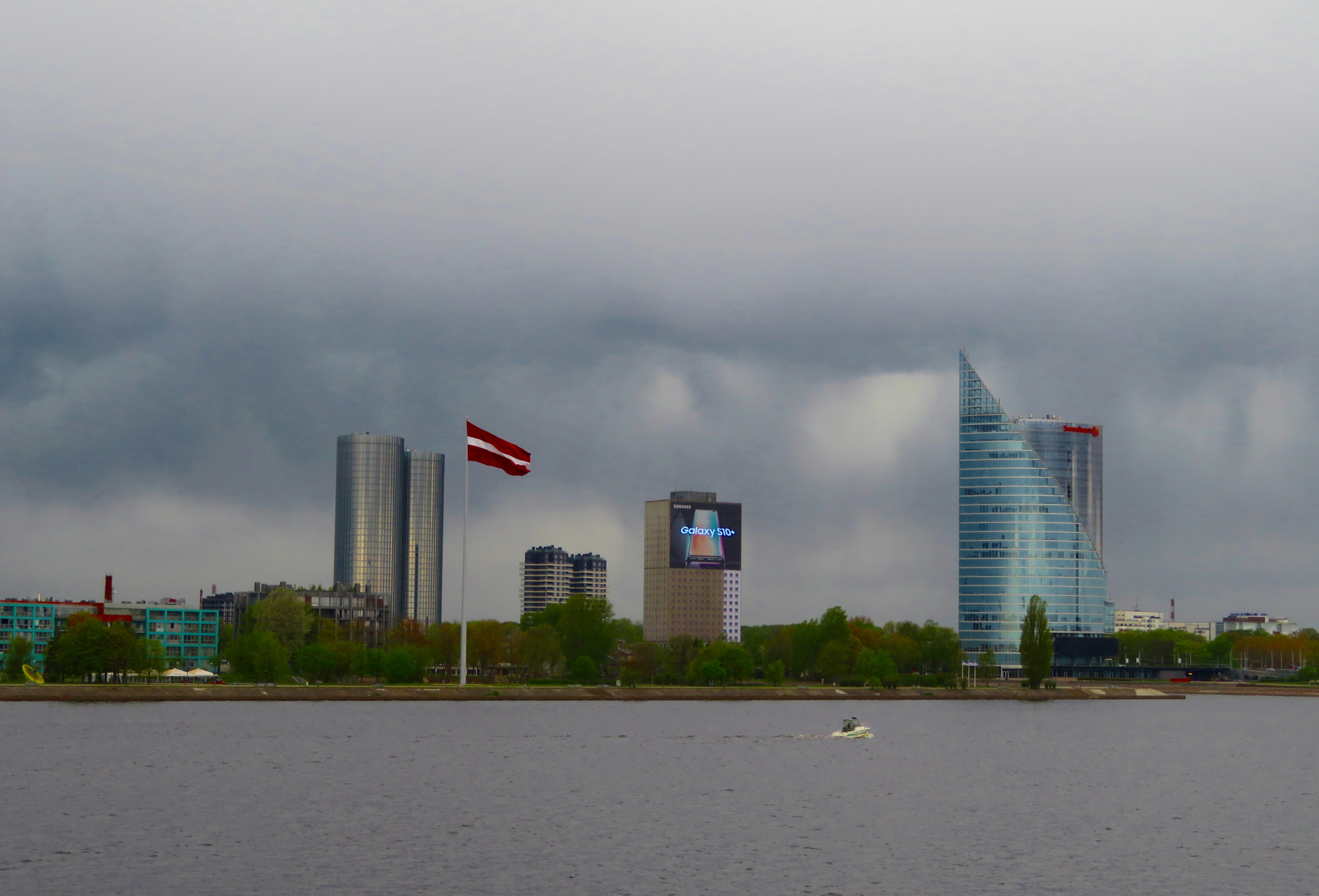 Skats no Akmens tilta